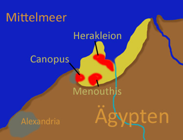 Karte von Nordägypten mit den untergegangenen Städten Herakleion, Kanopus und Menouthis